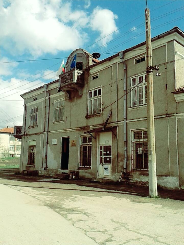 жбн